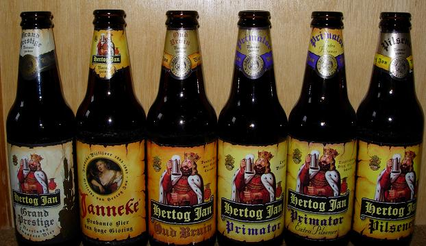 niederländische Bierflaschen